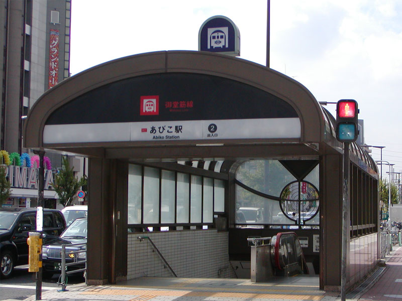 大阪市営地下鉄御堂筋線 あびこ駅 2号出入口